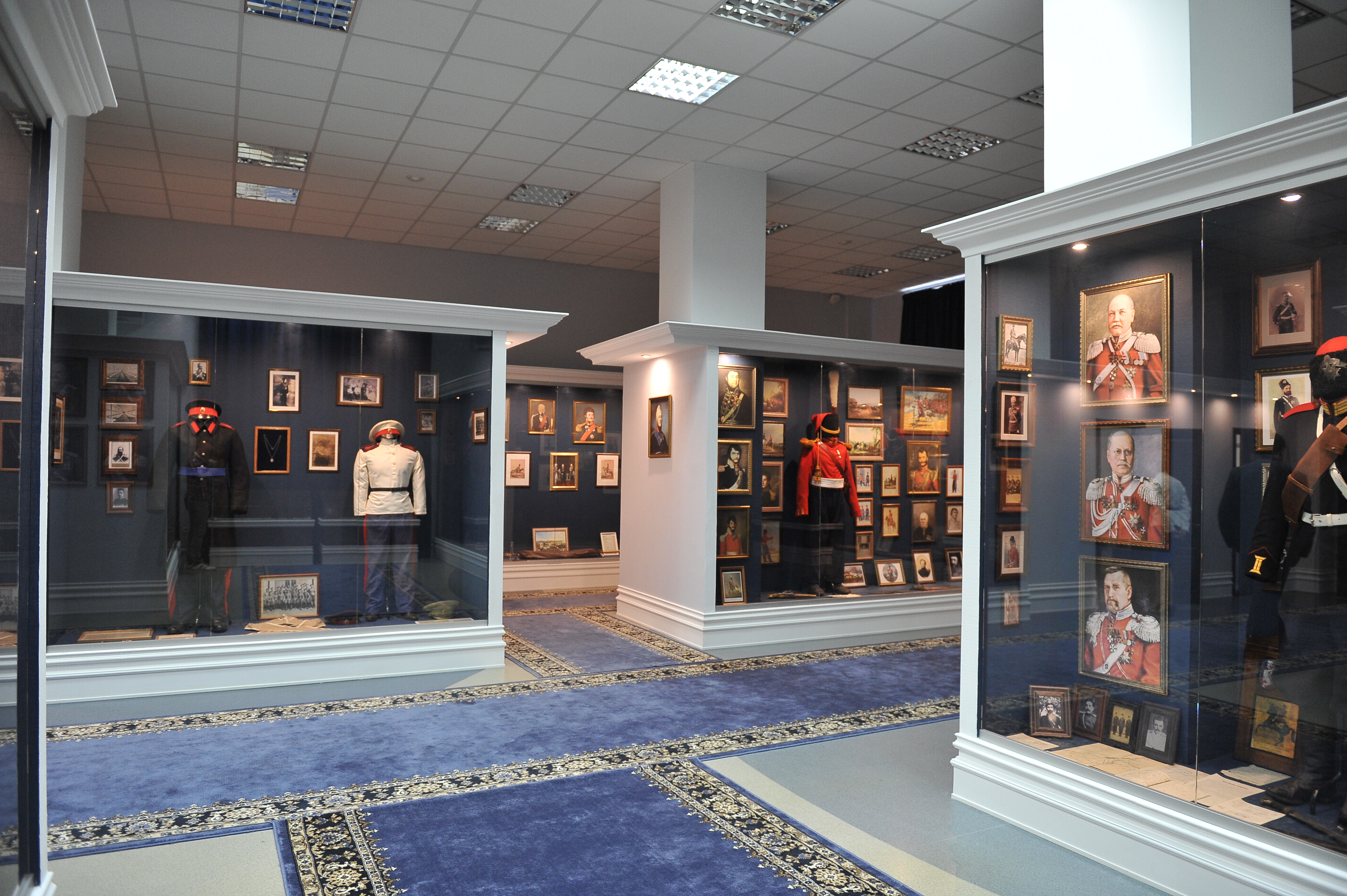 Выставочный зал Культурно-выставочного центра «Донская казачья гвардия»